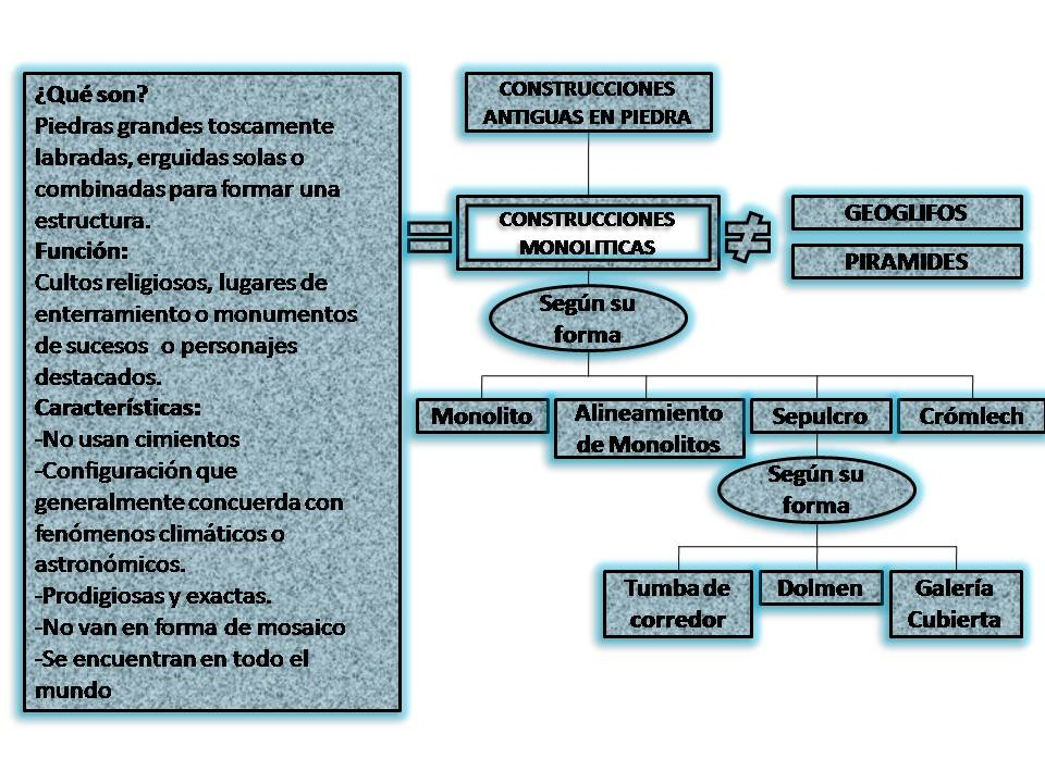 Mentefacto Construcciones Monolíticas